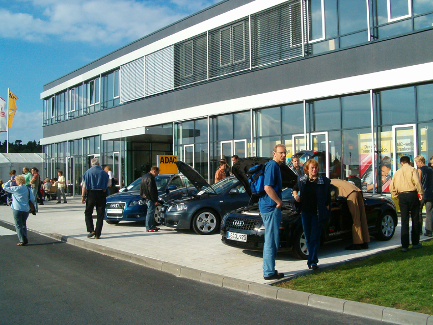 Eröffnung des ADAC Fahrsicherheitszentrum Lüneburg (Aug 04)